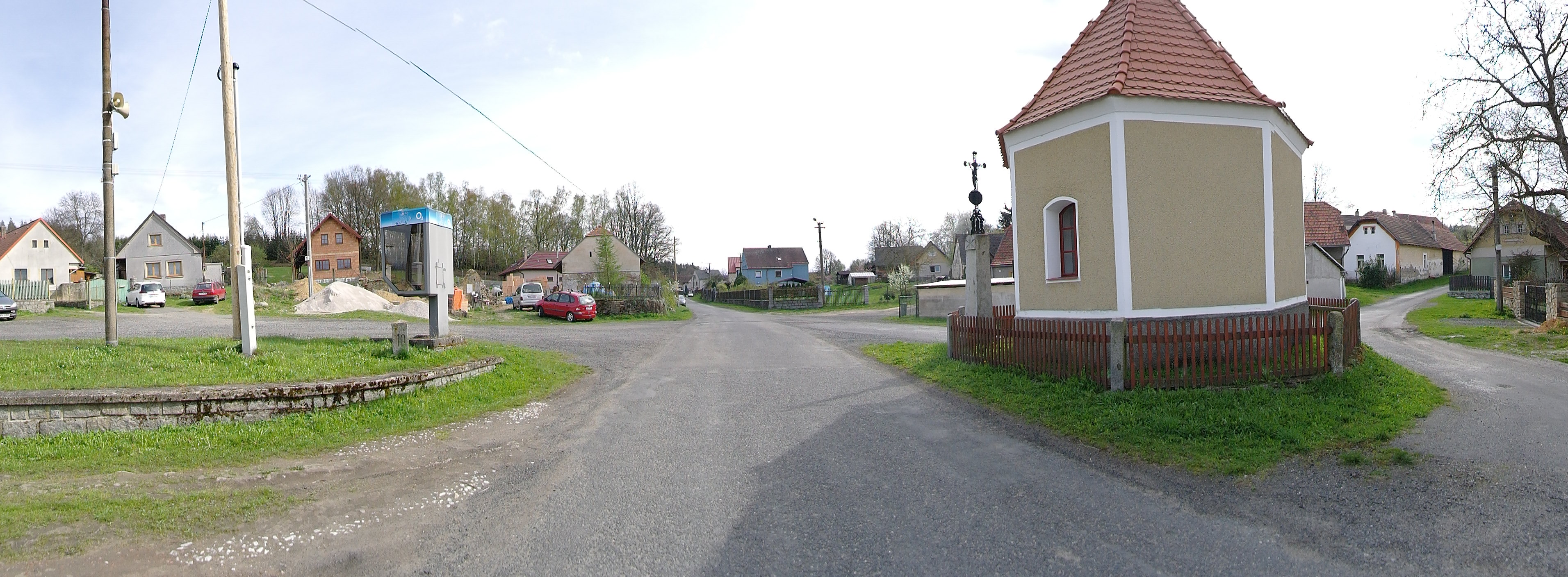 Milčice